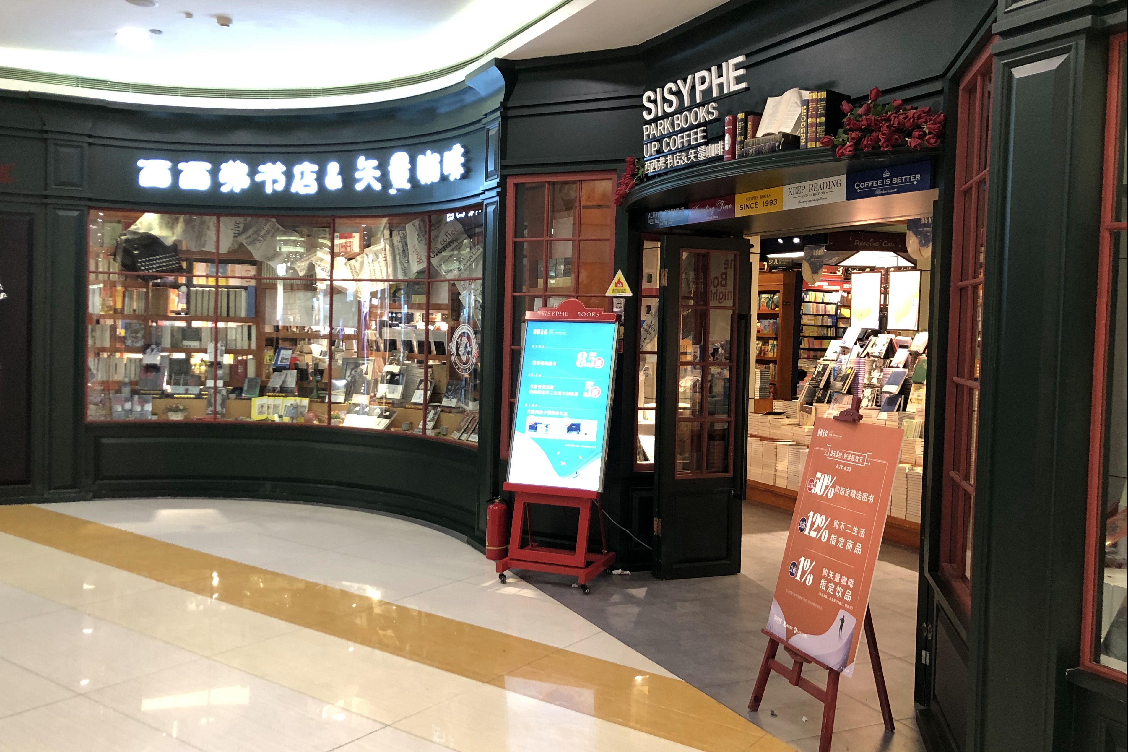 中文（中国大陆）: 西西弗书店国贸